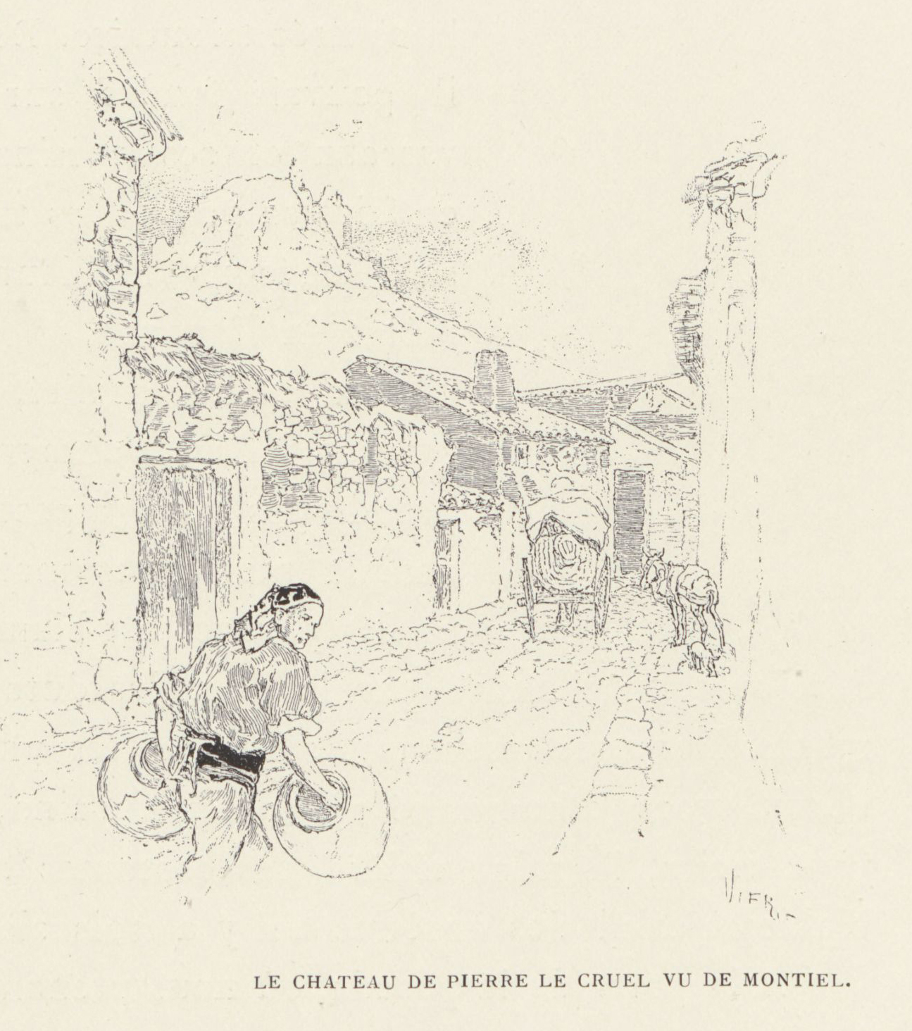 Le chateau de Pierre le Cruel vu de Montiel.